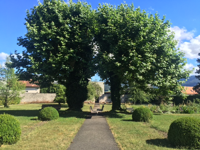 Photographie personnelle.